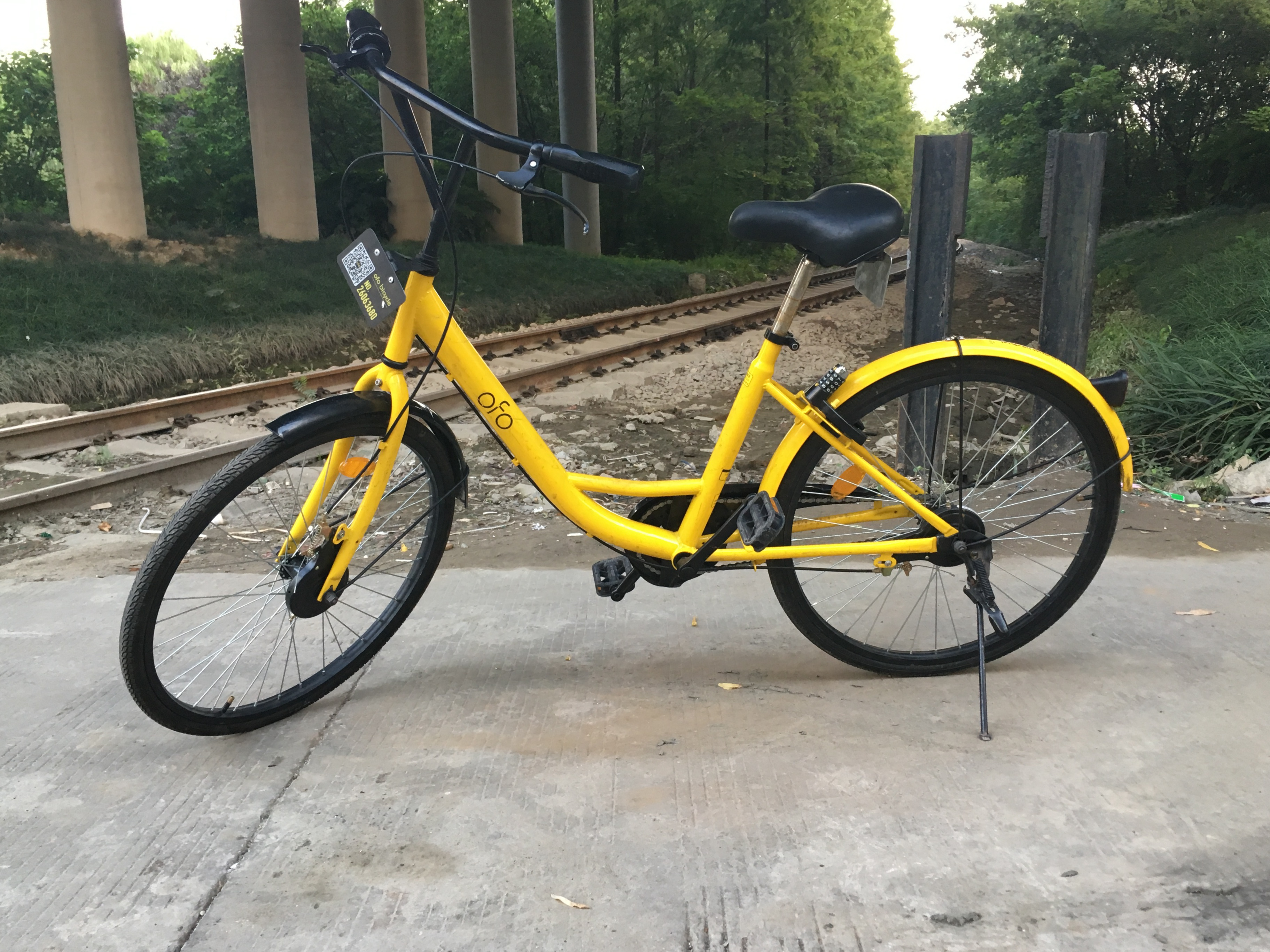 一部ofo3.1型单车